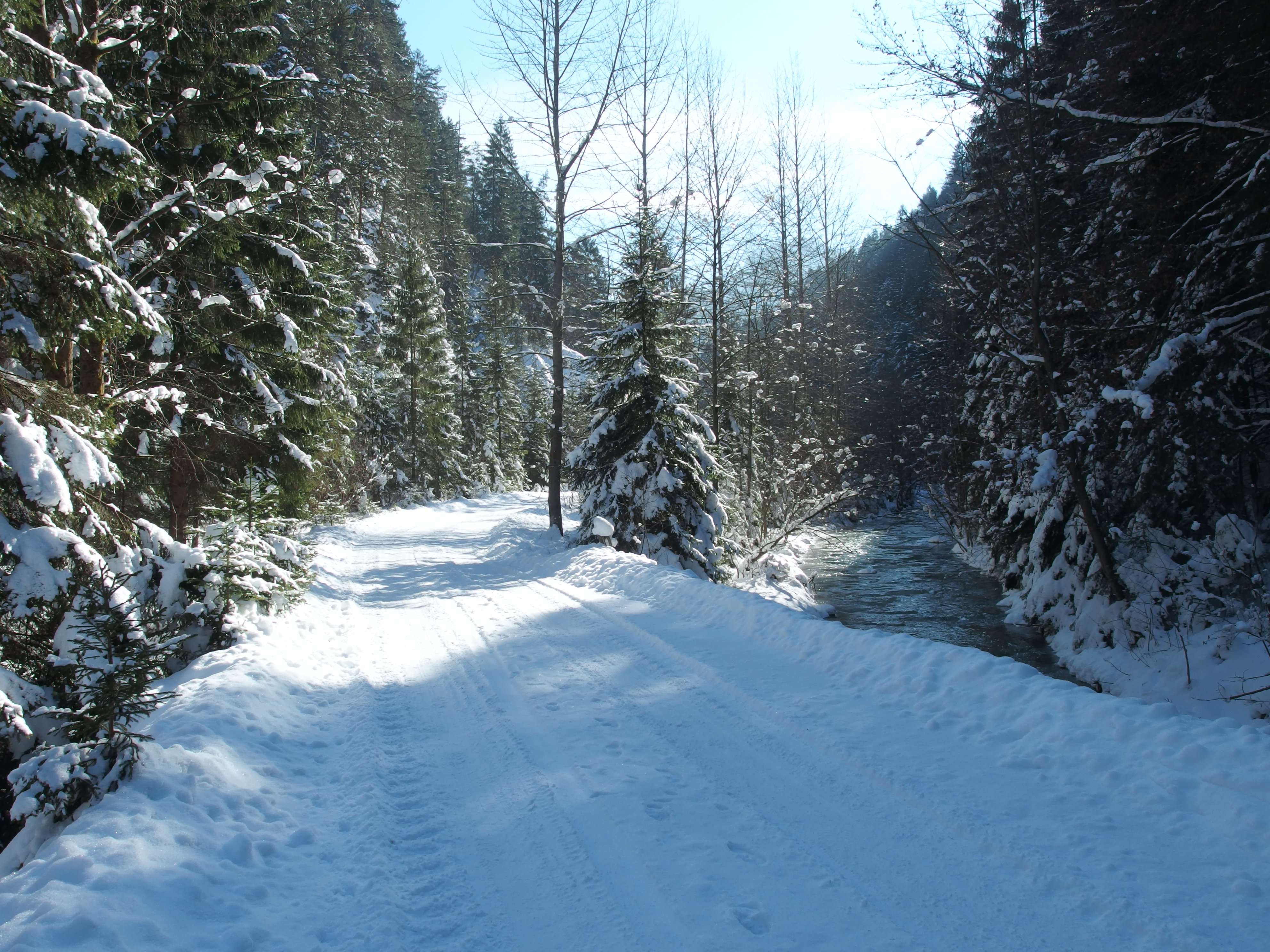 Zimná Necpalská dolina